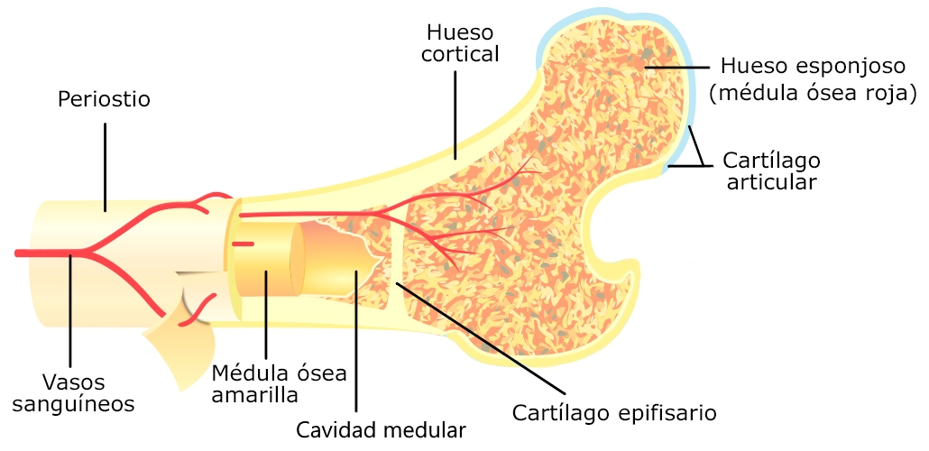 Esquema de un hueso en el que pueden observarse algunos de componentes principales, incluyendo la médula ósea roja y la médula ósea amarilla.